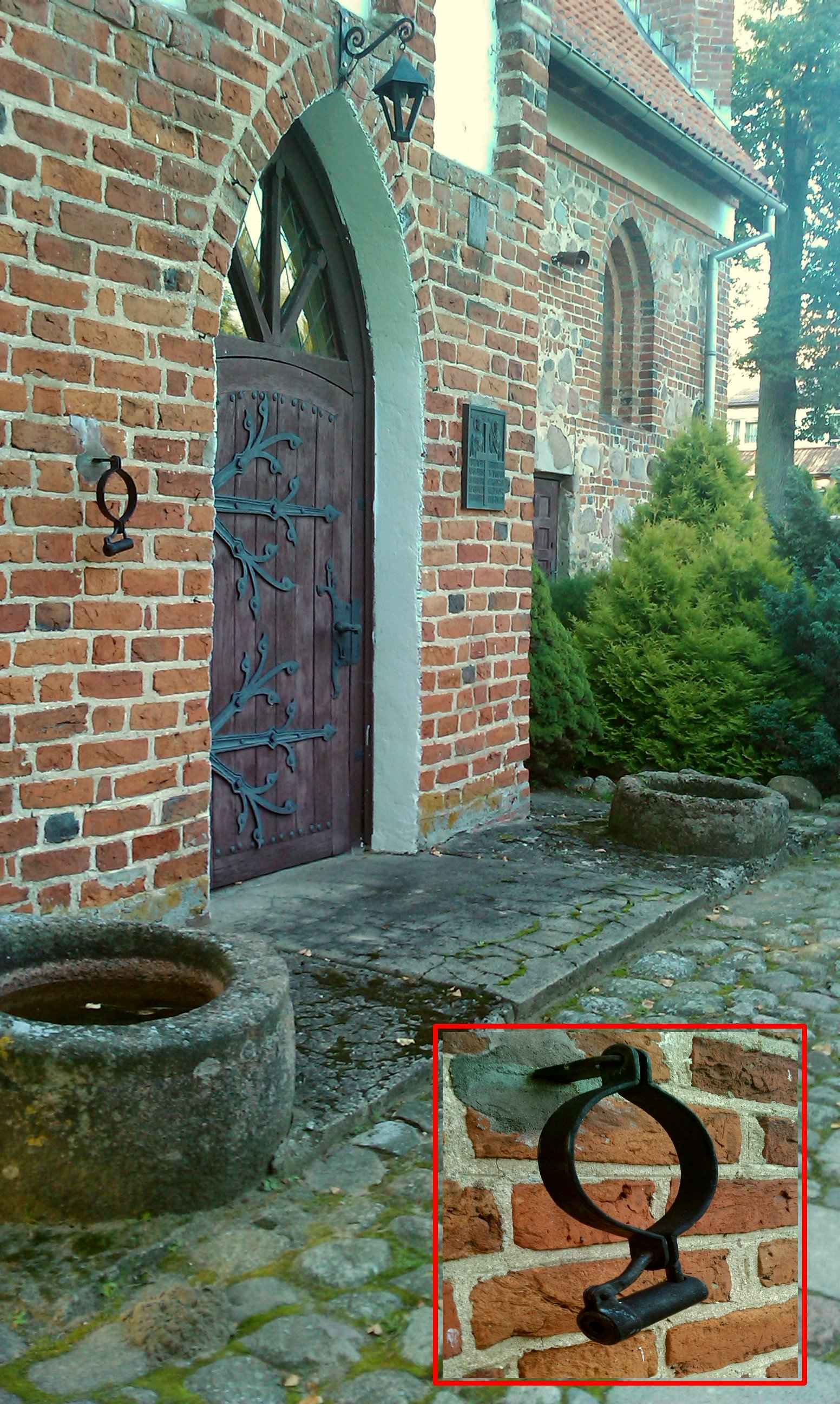 Drzwi do zakrystii.